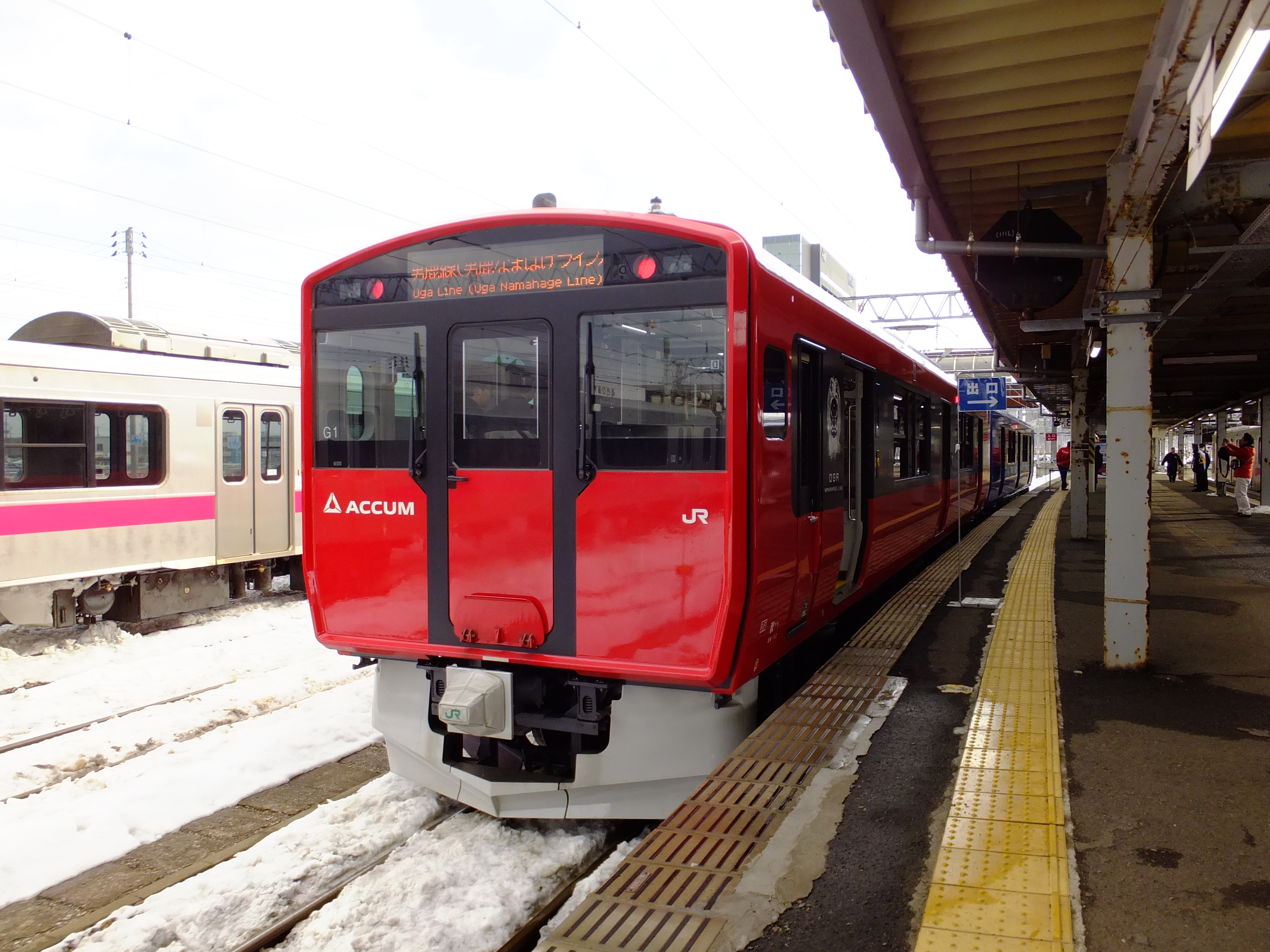 2017年3月より男鹿線で営業運転を開始したEV-E801系。営業開始に先立つ2月25日に秋田駅で行われた車両展示会にて